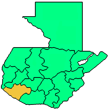 Mappa della diocesi cattolica di Suchitepéquez-Retalhuleu, in Guatemala. Lavoro personale eseguito a partire da questa immagine di Commons. Fonte per i confini delle diocesi